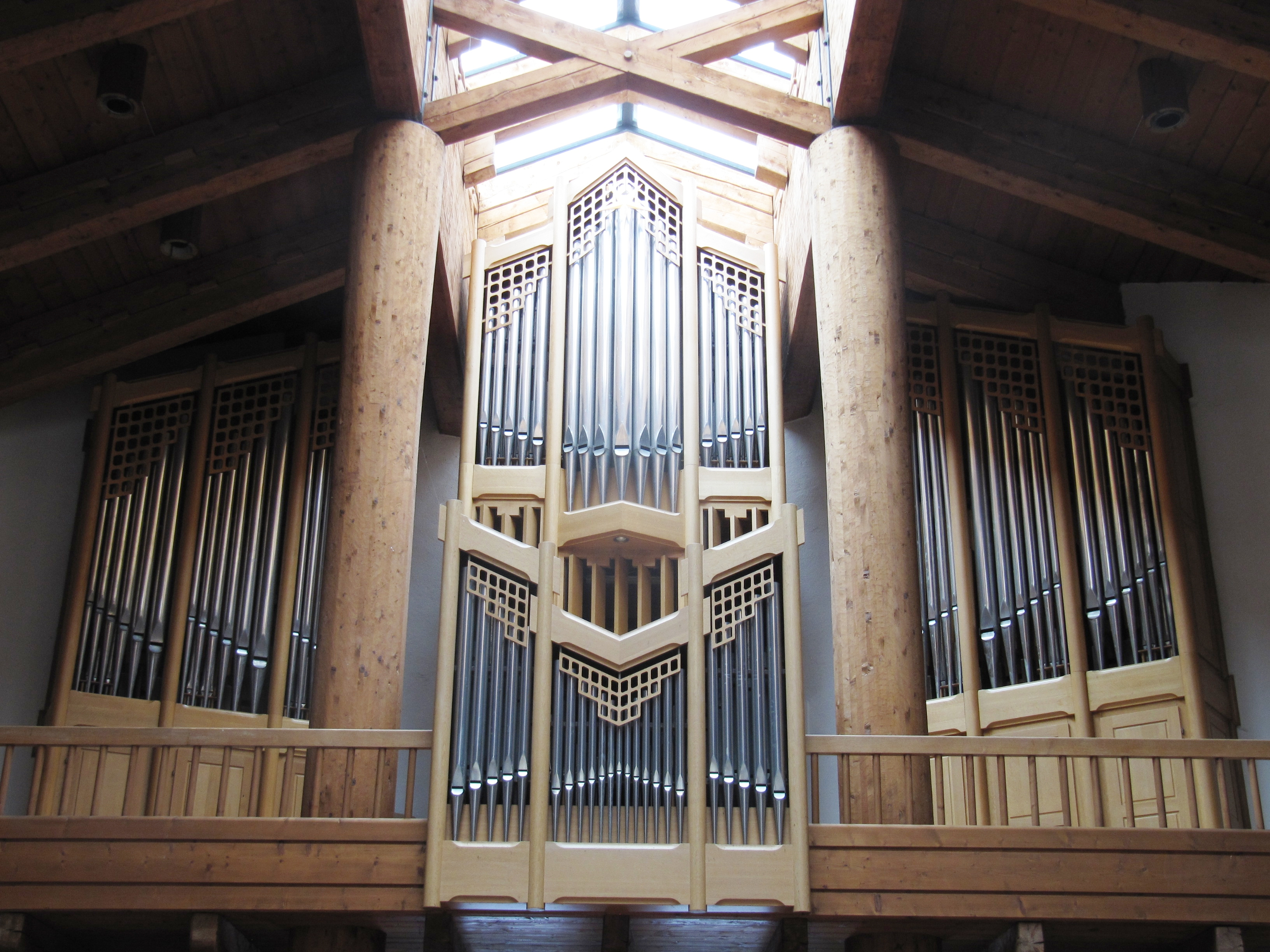 Orgel in Diesenbach, erbaut von Eisenbarth